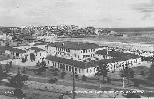 Bondi surf pavilion, circa 1930